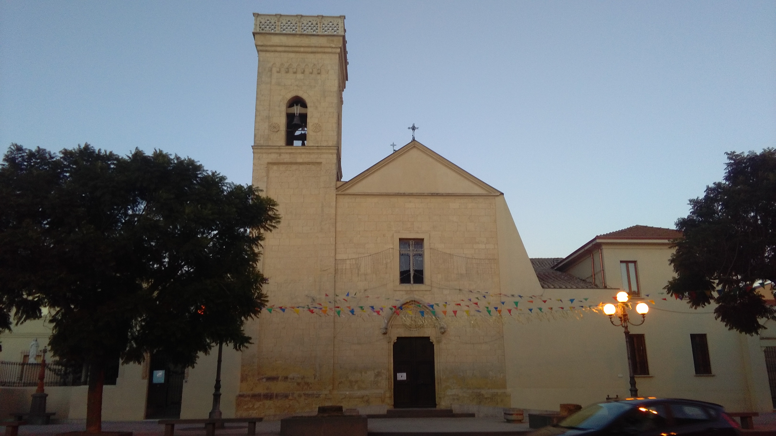 La Parrocchia San Biagio di fronte